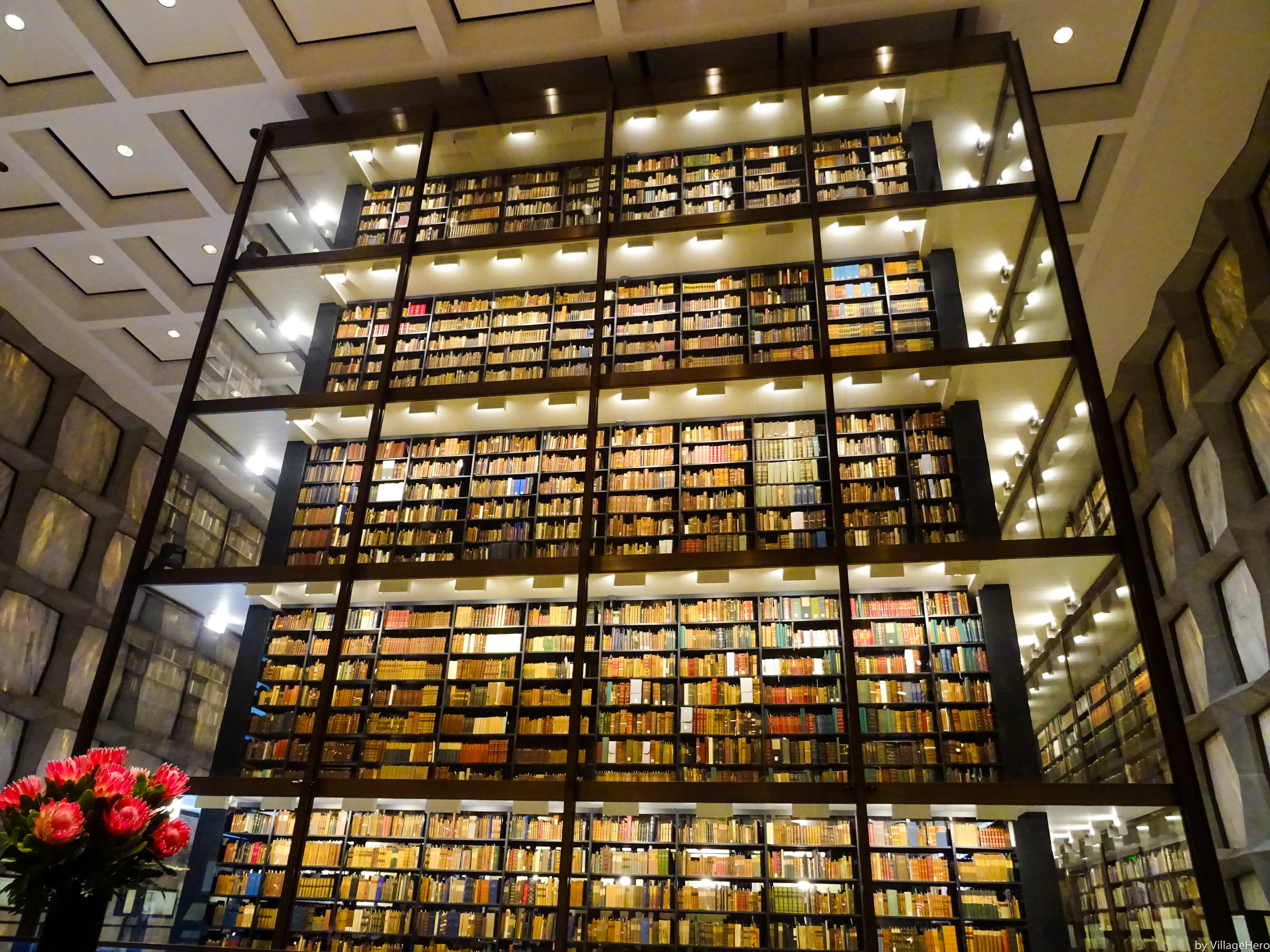 by